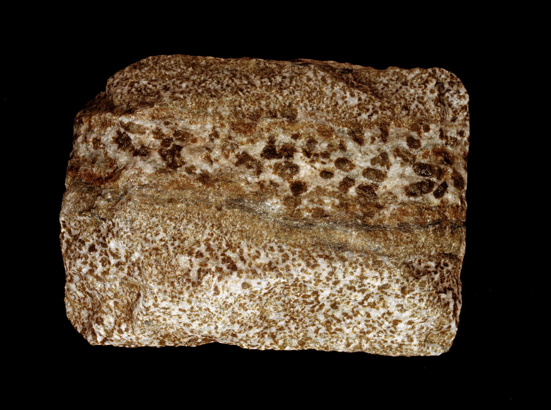 Östergötlands landskapsten, den ljusgröna till grönsvarta kolmårdsmarmorn, är en 1900 till 2000 miljoner år gammal omkristalliserad kalksten från området kring Kolmården. Den återfinns med några meters tjocklek i vit kalksten, är mycket rik på serpentin (ett vattenhaltigt magnesiumrikt silikatmineral) och kalksilikatmineral som ger kolmårdsmarmorn dess utseende.